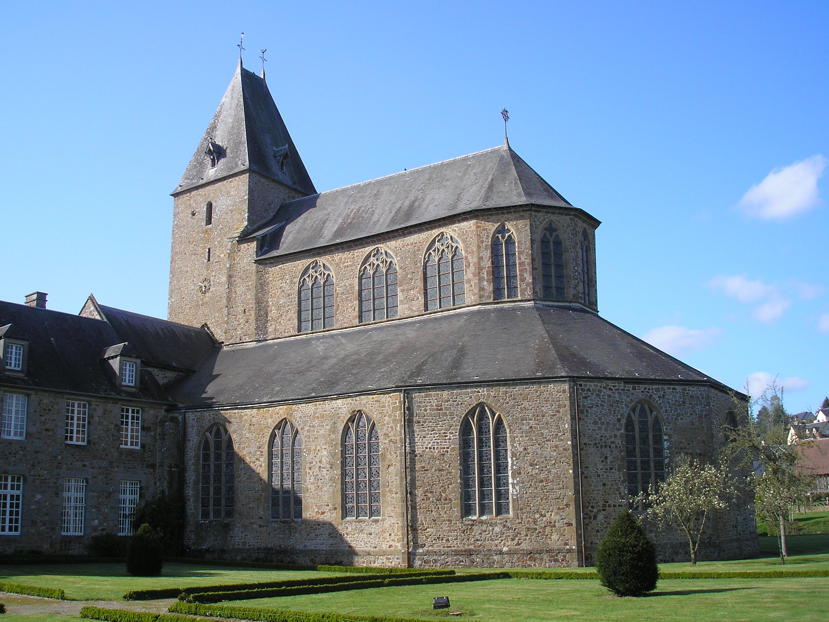 Lonlay-l'Abbaye (Normandie, France). L'abbaye, côté chevet.